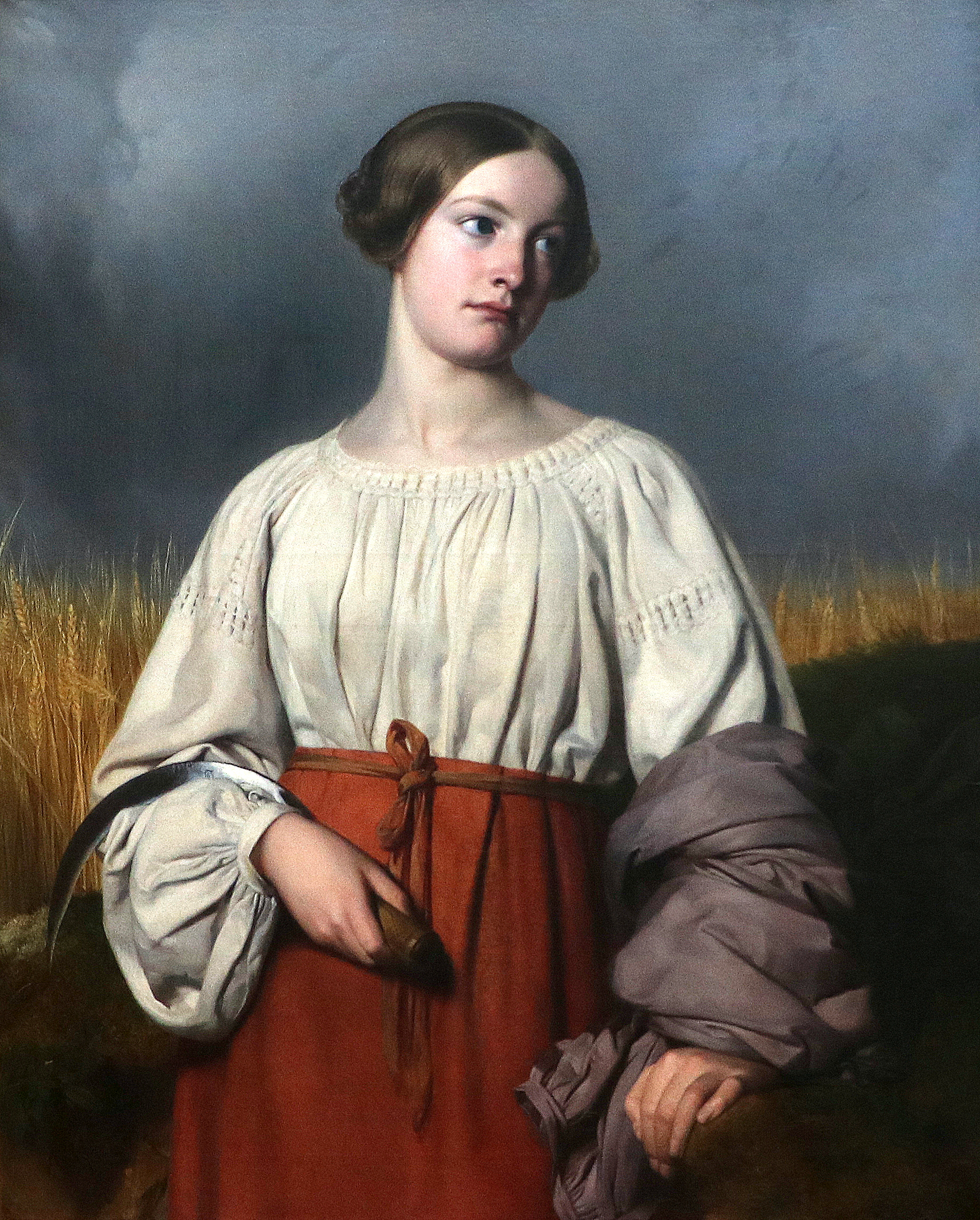 Moissonneuse tenant sa faucille (1837) par Alexandre Hesse Huile sur toile Don Clarke de Feltre, 1852 Inv. 1022 Musée d’arts de Nantes, France